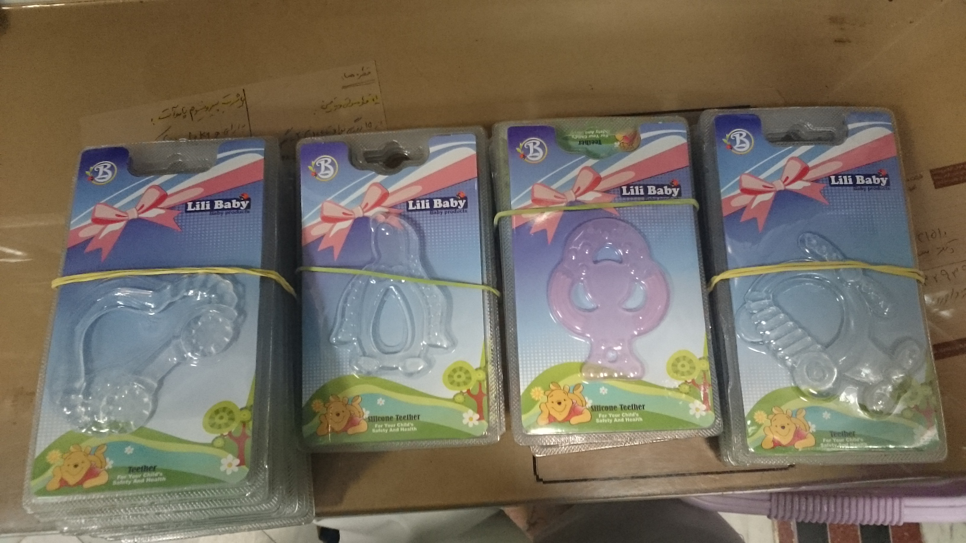 دندانگیر